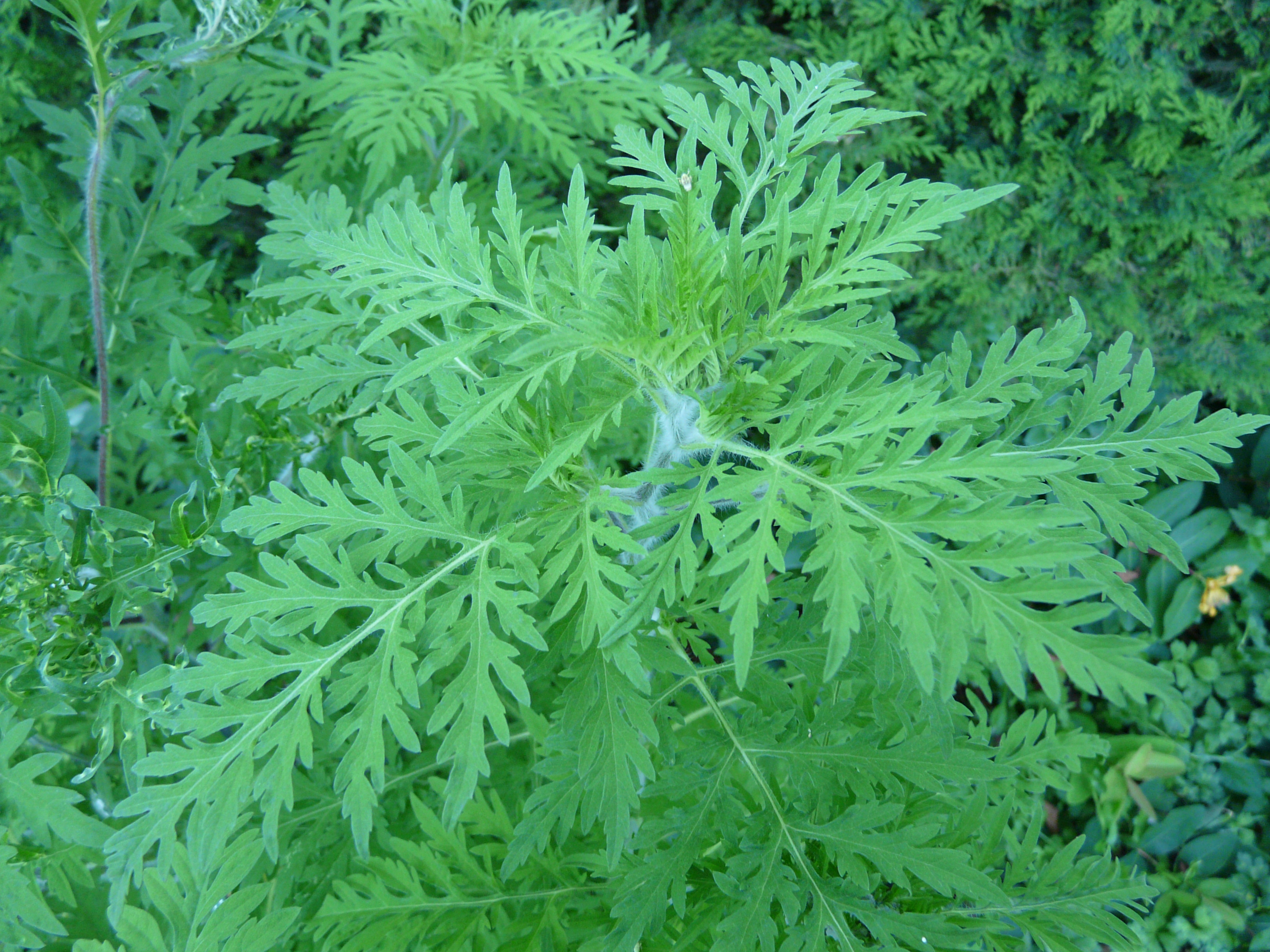 Ambroisie à feuilles d'armoise (Ambrosia artemisiifolia) à Périgueux, Dordogne, France.